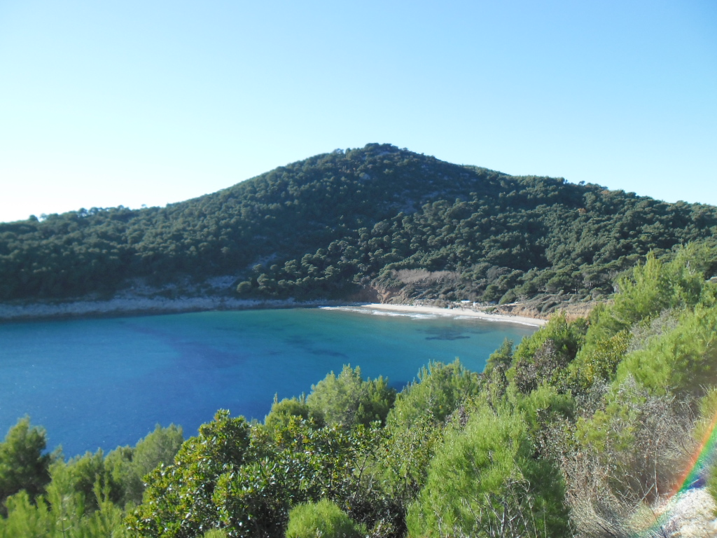 lopudska plaža Šunj 11. prosinca 2013.